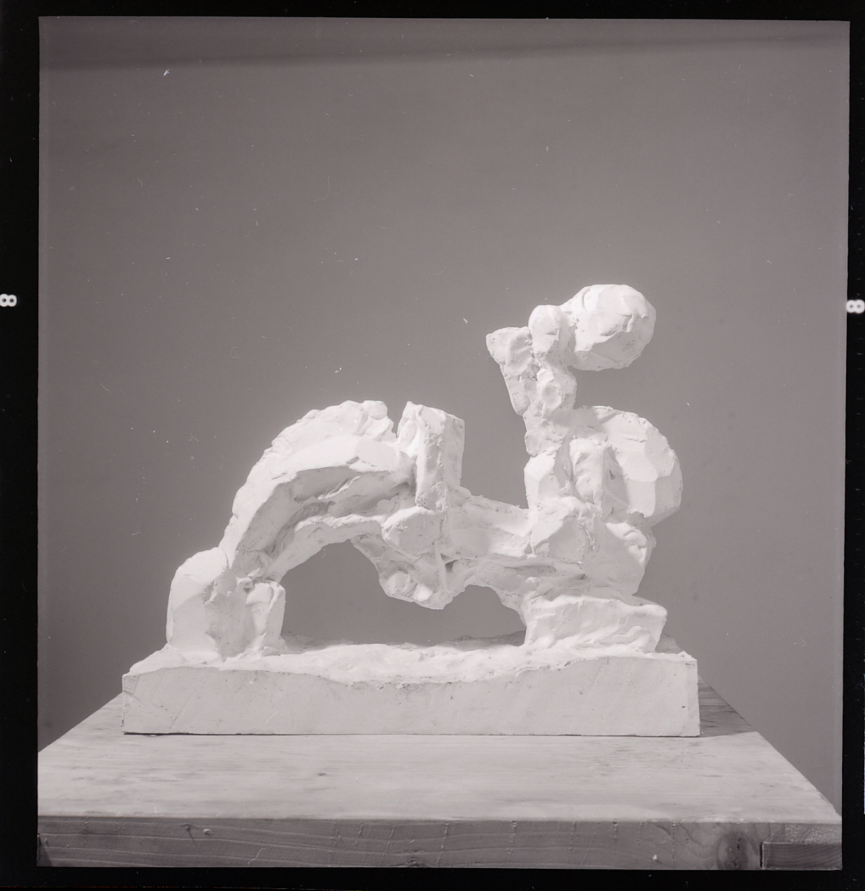 Servizio fotografico : Milano, 1968 / Paolo Monti. - Buste: 11, Fototipi: 11 : Negativo b/n, gelatina bromuro d'argento/ pellicola ; 6x6. - ((Serie costituita da 11 buste sciolte di negativi identificati con i nn.: 14808, 14809, 14810, 14811, 14812, 14813, 14814, 14815, 14816, 14817, 14818. - La suddetta serie è contenuta nella scatola G14501-145000, formato 24x30. - , presso Archivio Paolo Monti. - Fonte: Agenda di Paolo Monti: Monti/ 3 aprile 1966 - 9 marzo 1971/ 12421-16823 (1966-1971)